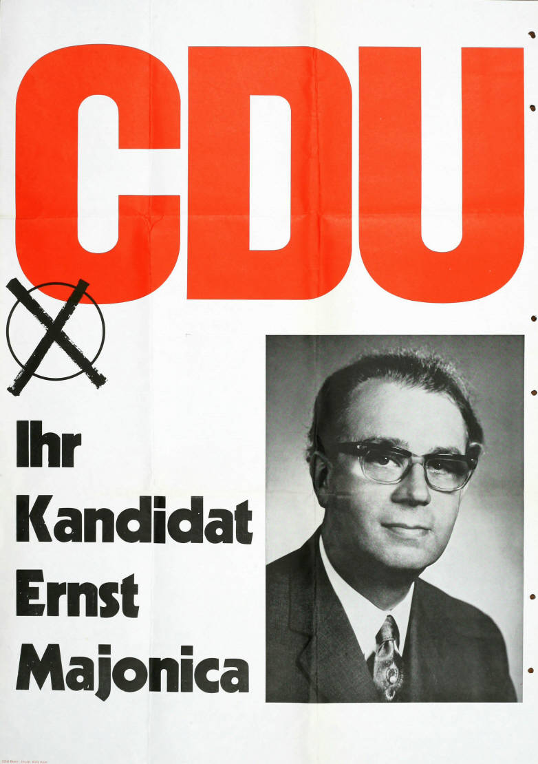 CDU Ihr Kandidat Ernst MajonicaAbbildung:Porträtfoto - StimmkreuzPlakatart:Kandidaten-/Personenplakat mit PorträtAuftraggeber:CDU BonnDrucker_Druckart_Druckort:KVD, KölnObjekt-Signatur:10-001 : 1486Bestand:Plakate zu Bundestagswahlen ( 10-001)GliederungBestand10-18:Plakate zu Bundestagswahlen (10-001) » Die 6. Bundestagswahl am 28. September 1969 » CDU » Mit PorträtfotoLizenz:KAS/ACDP 10-001 : 1486 CC-BY-SA 3.0 DE